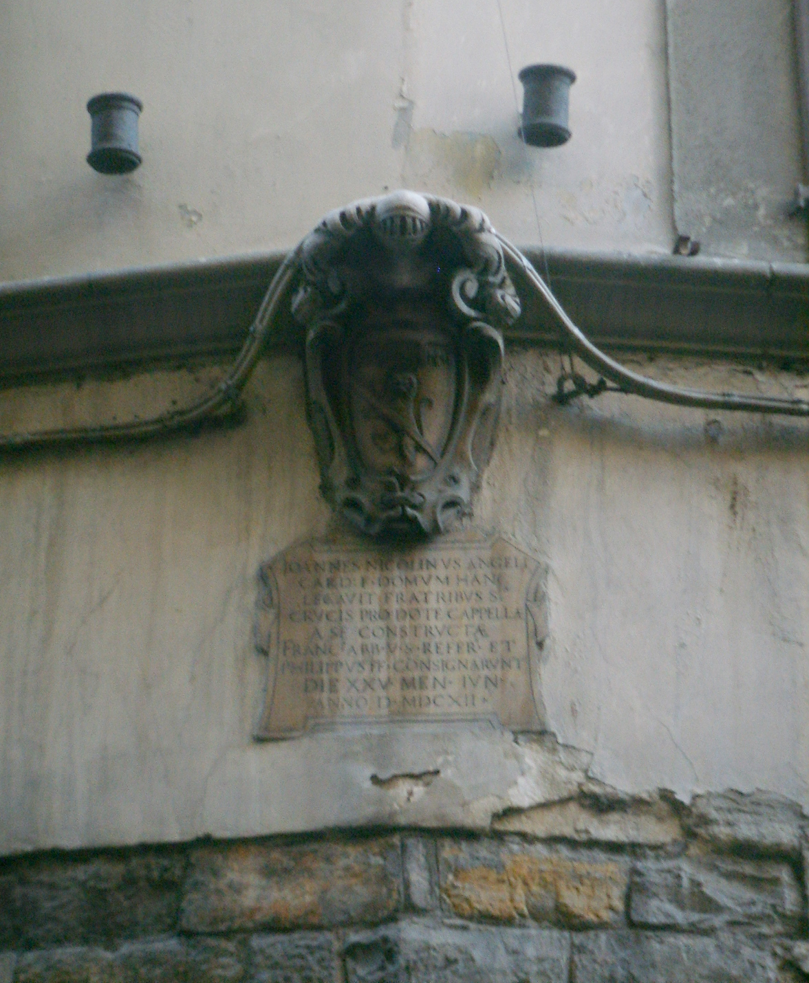 Torre_dei_Bagnesi in Florence, Italy